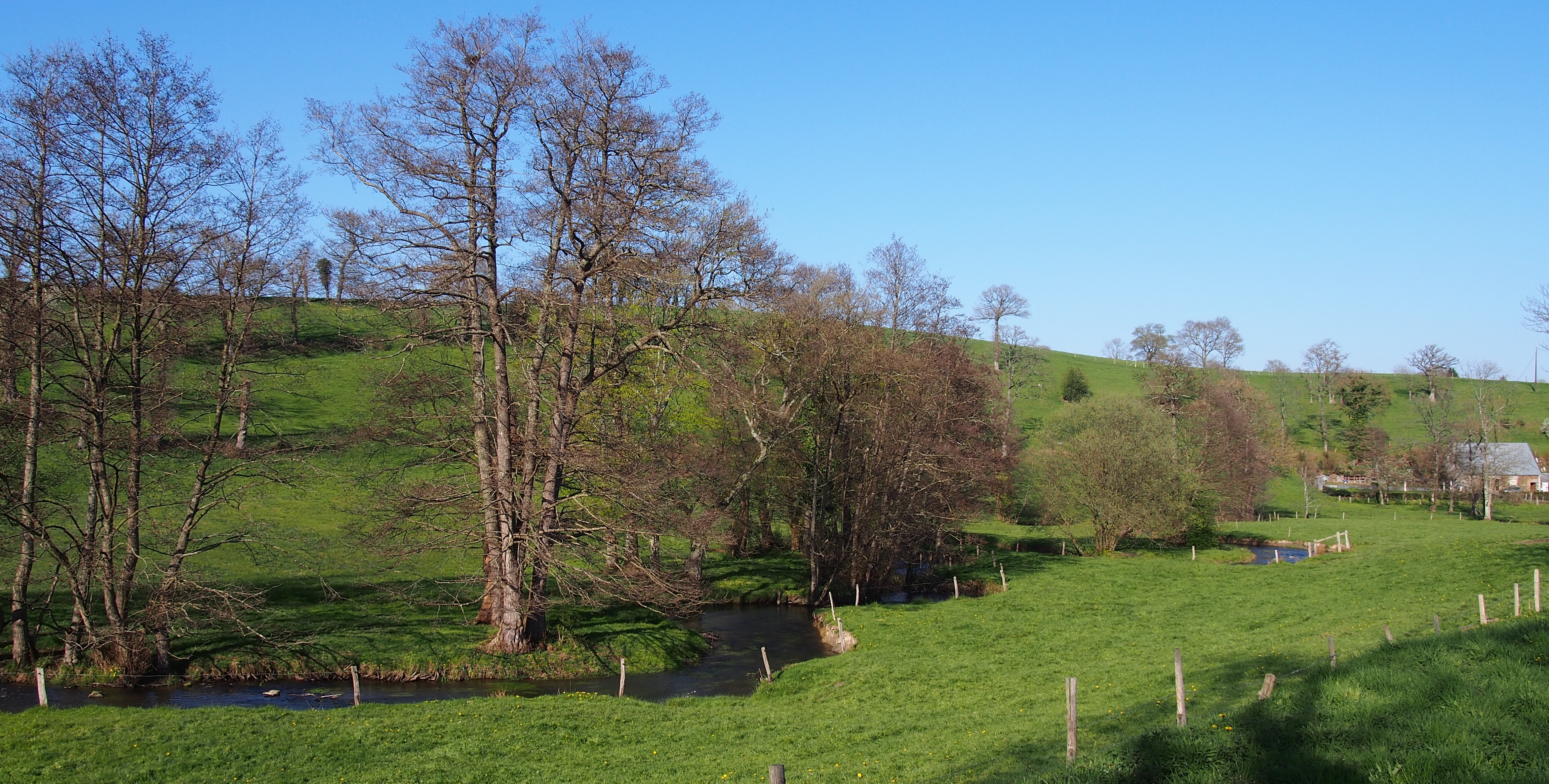 Clairefougère (Normandie, France). La Diane.